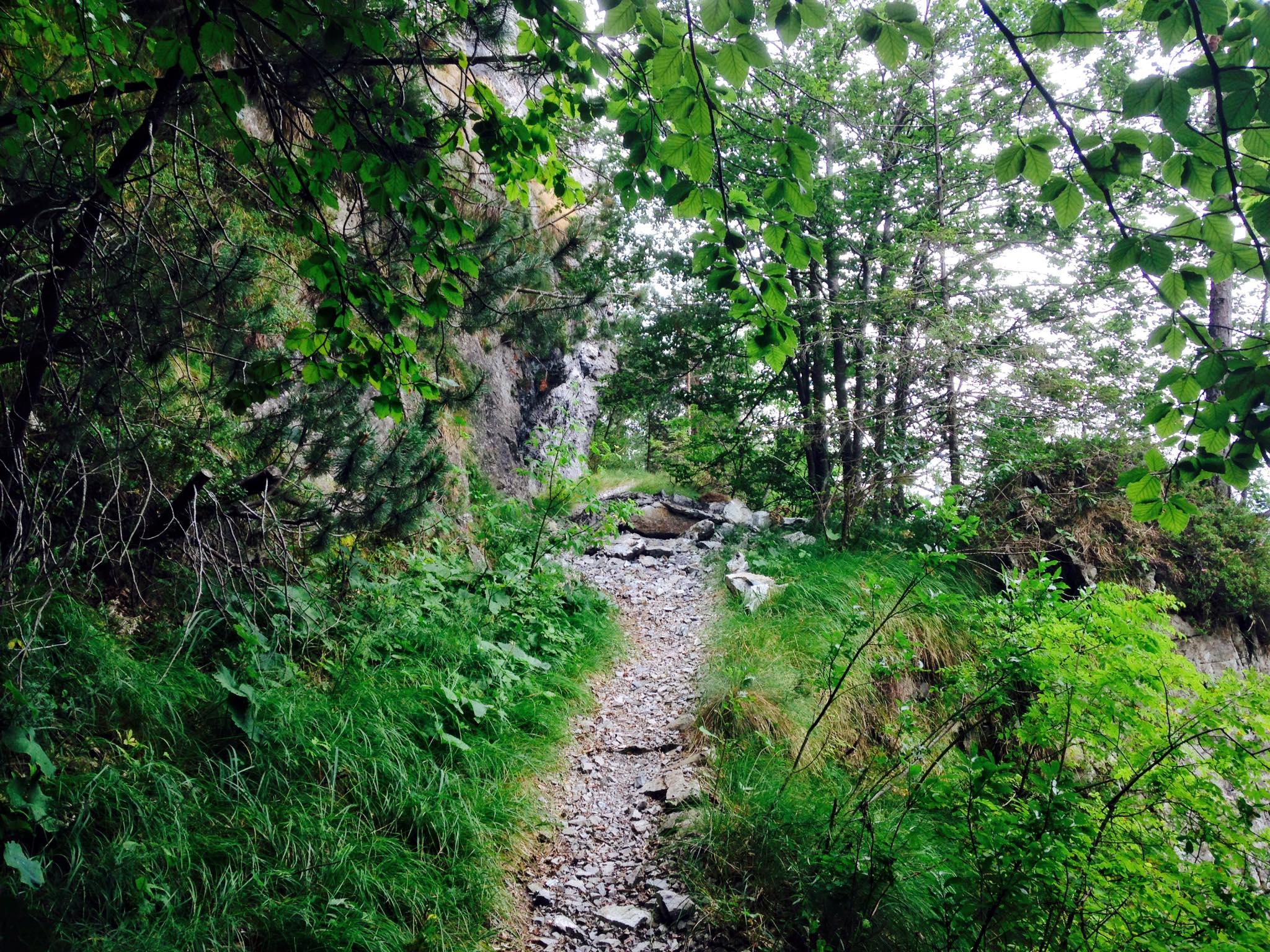 sentiero della Calva in Valvestino